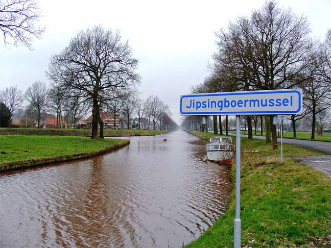 Jipsingboermussel aan het Ter Apelkanaal